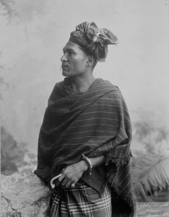 foto. Portret van panghulu Sialang Bula, een Simalungun Batak